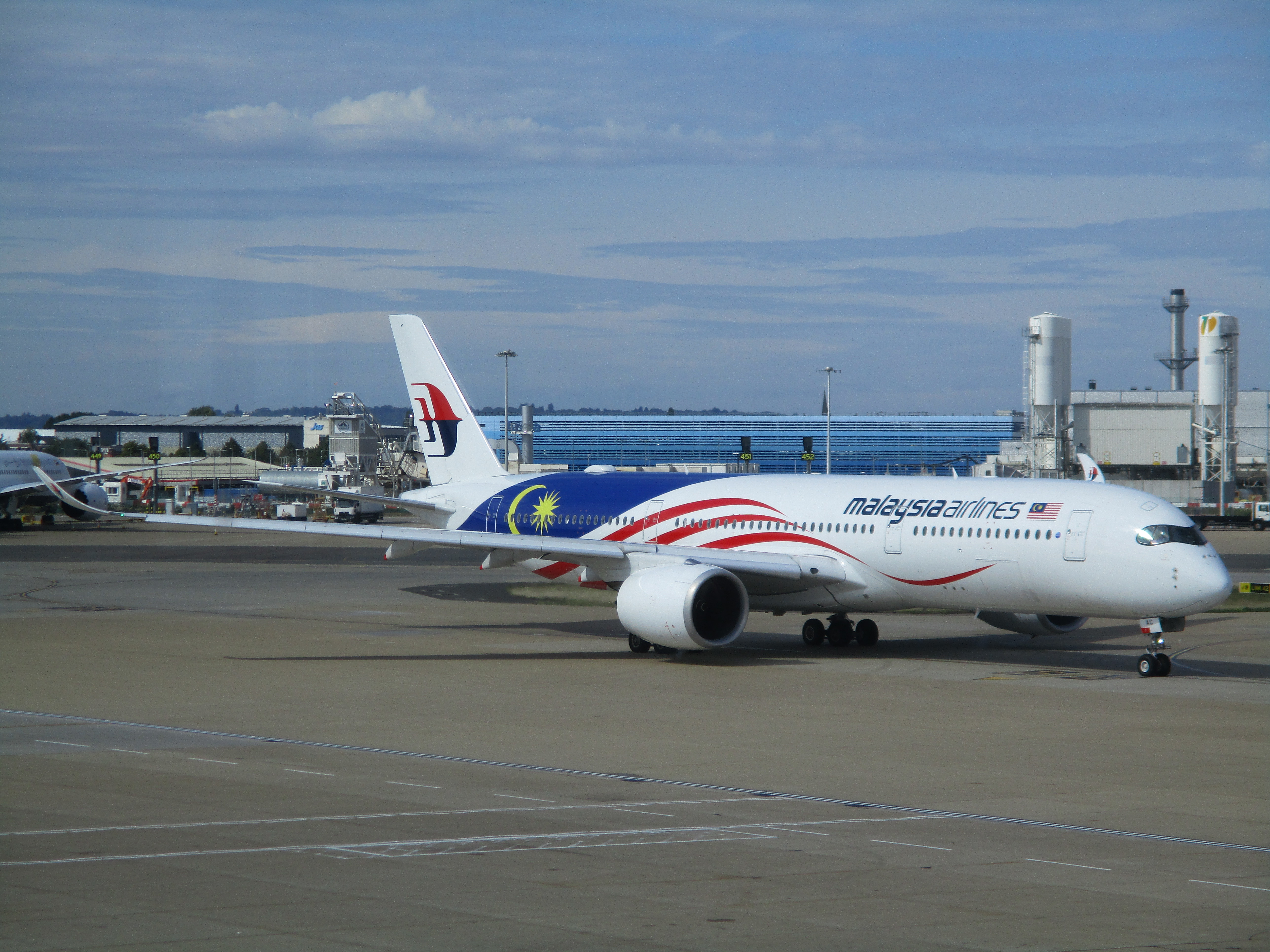 2019年8月、ロンドンのヒースロー空港で撮影。